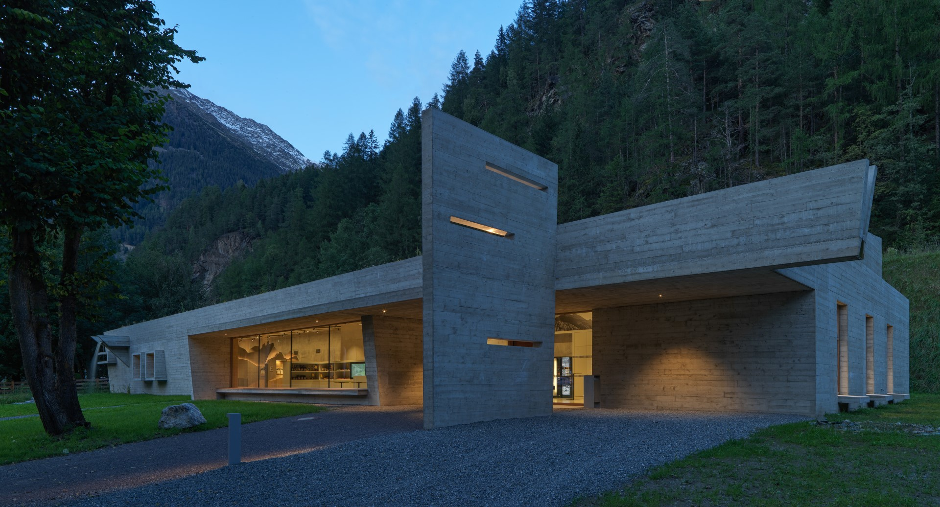 Naturpark Haus Längenfeld © Günter Wett